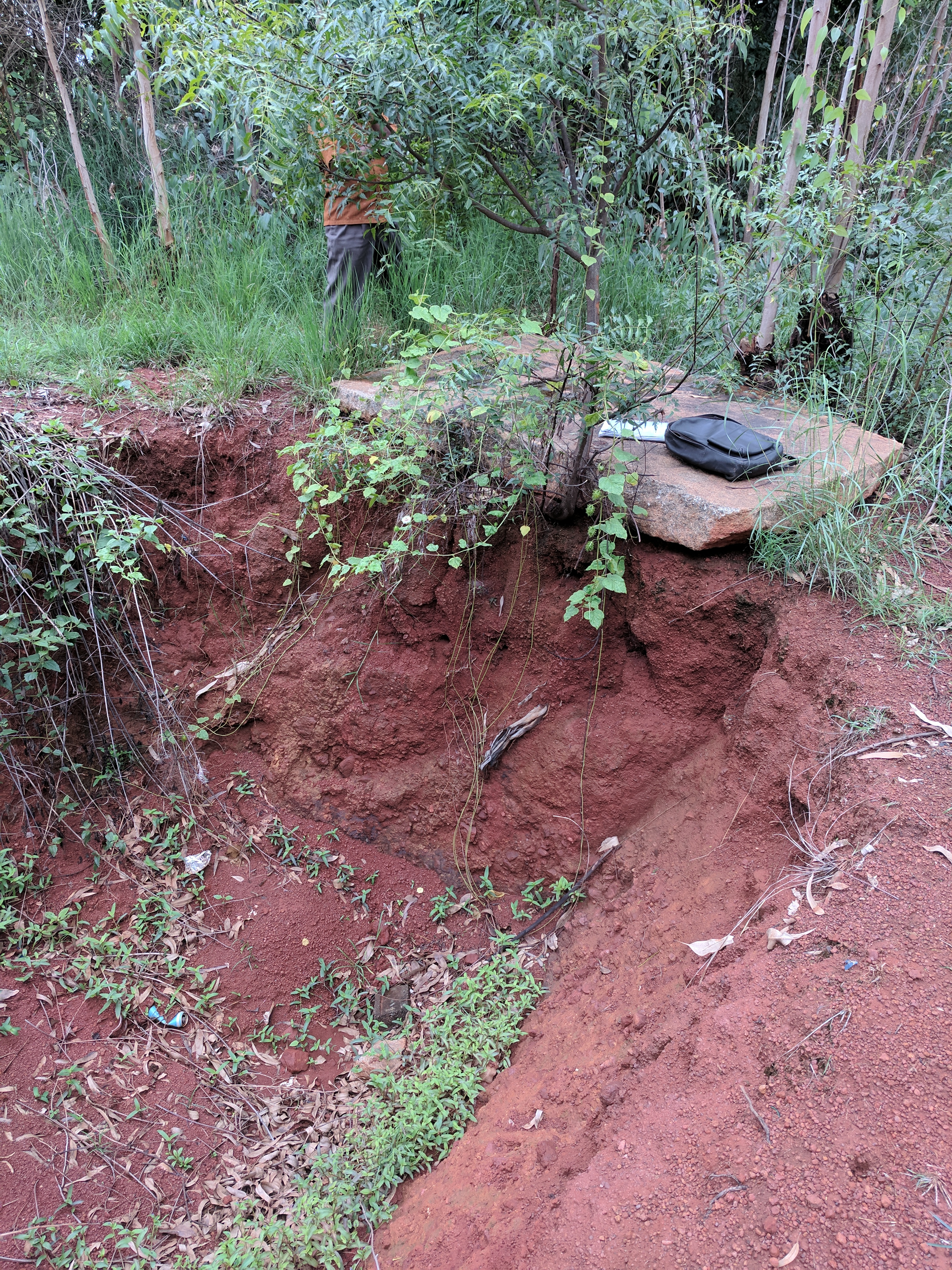 ಕನ್ನಡ: ಅವಲಹಳ್ಳಿ ಶಿಲಾಶಾಸನ